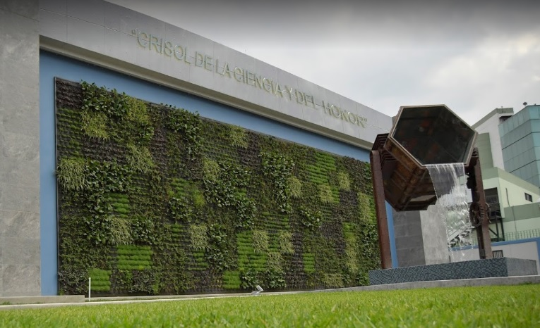 fachada de la emi